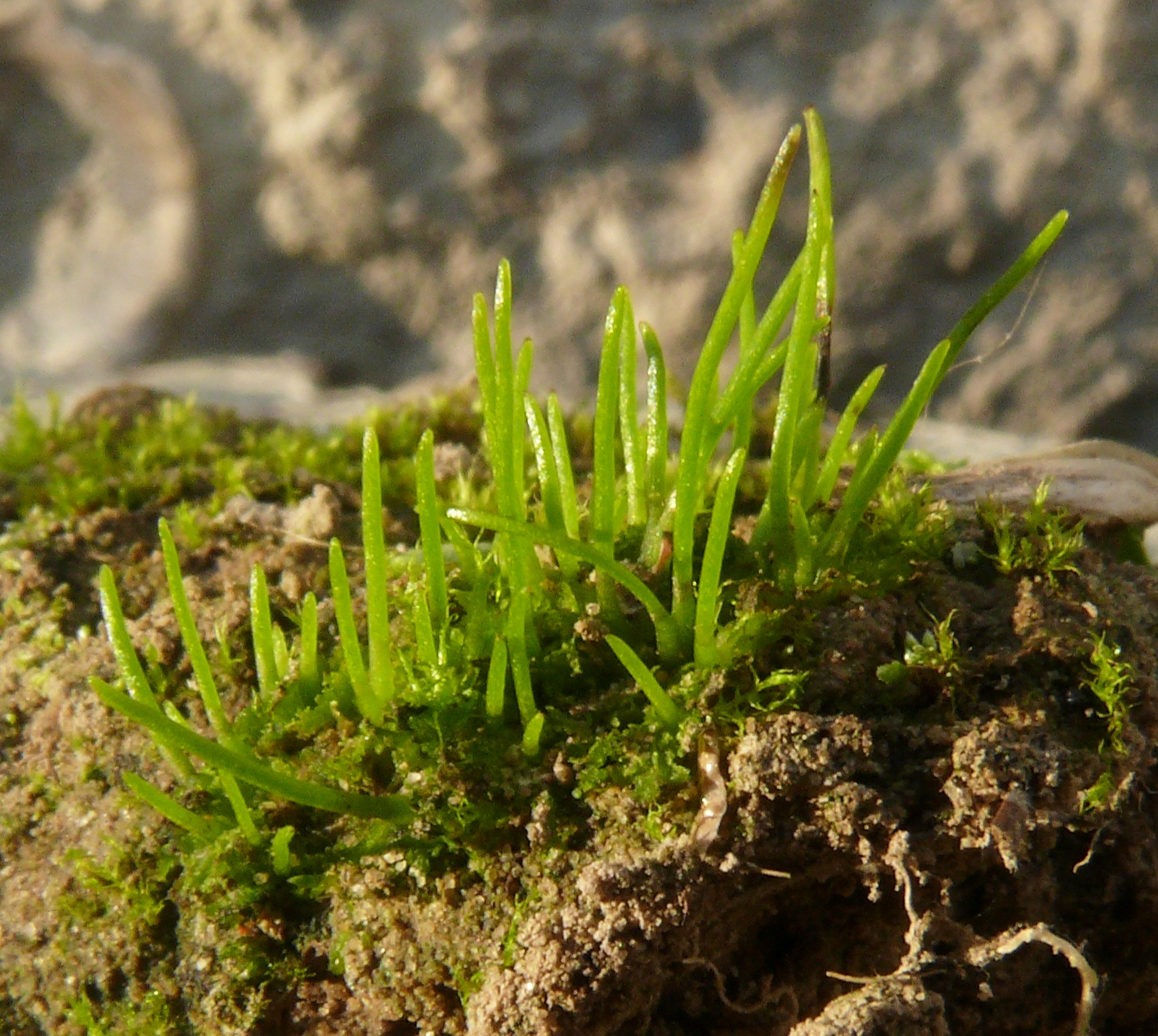 Anthoceros agrestis, Schwäbisch-Fränkische Waldberge, Deutschland